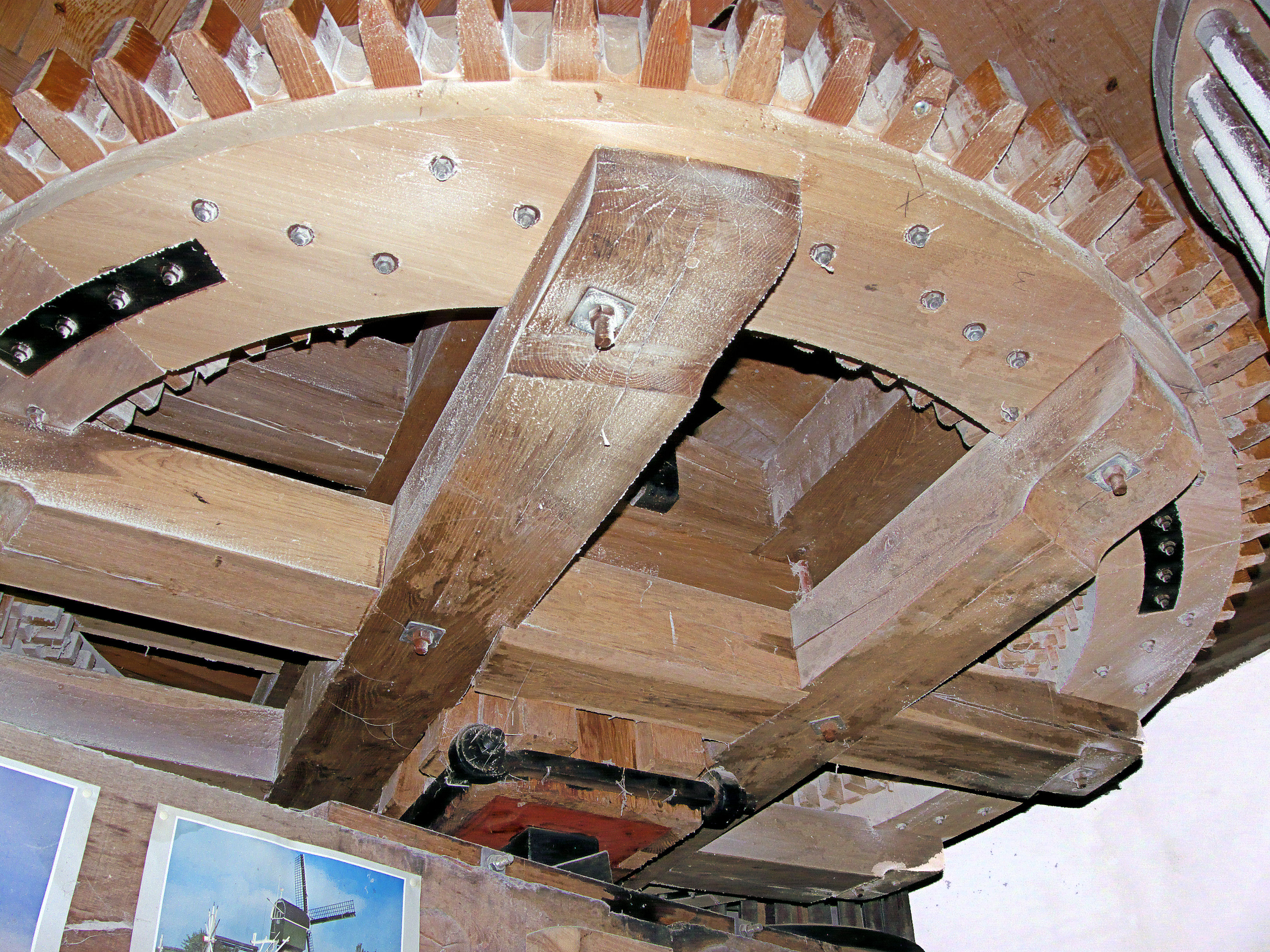 Molen Oog in 't Zeil Cothen, spoorwiel met dubbele kruisarmen en losse dammen